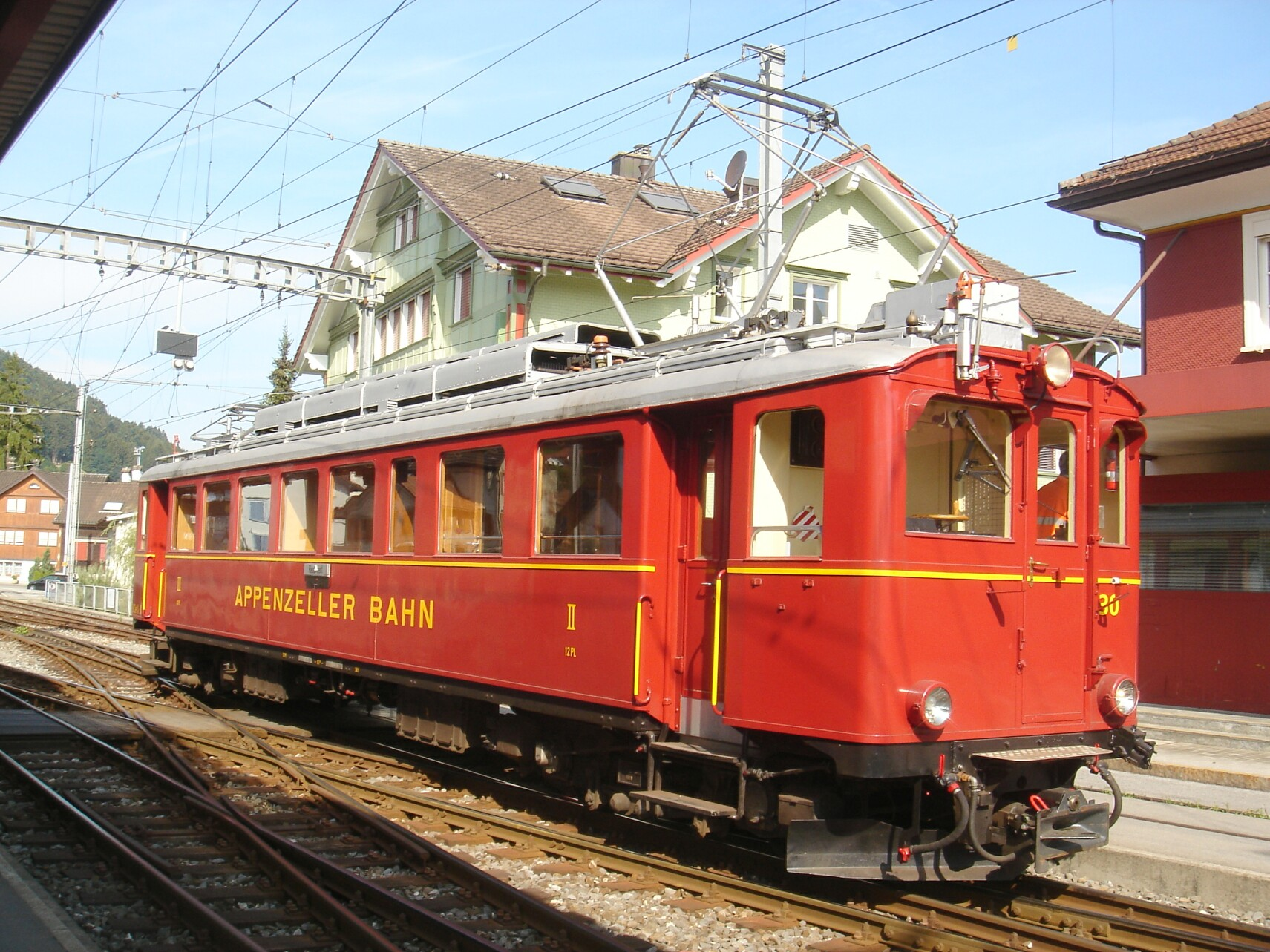 AB BCe 4/4 30 (Serie 27-30) im Anstrich des Ablieferungszustands 1933, nun jedoch mit automatischer +GF+-Kupplung ausgerüstet. Dazwischen verkehrte der Triebwagen als ABe 4/4 43 (Serie 40-43).